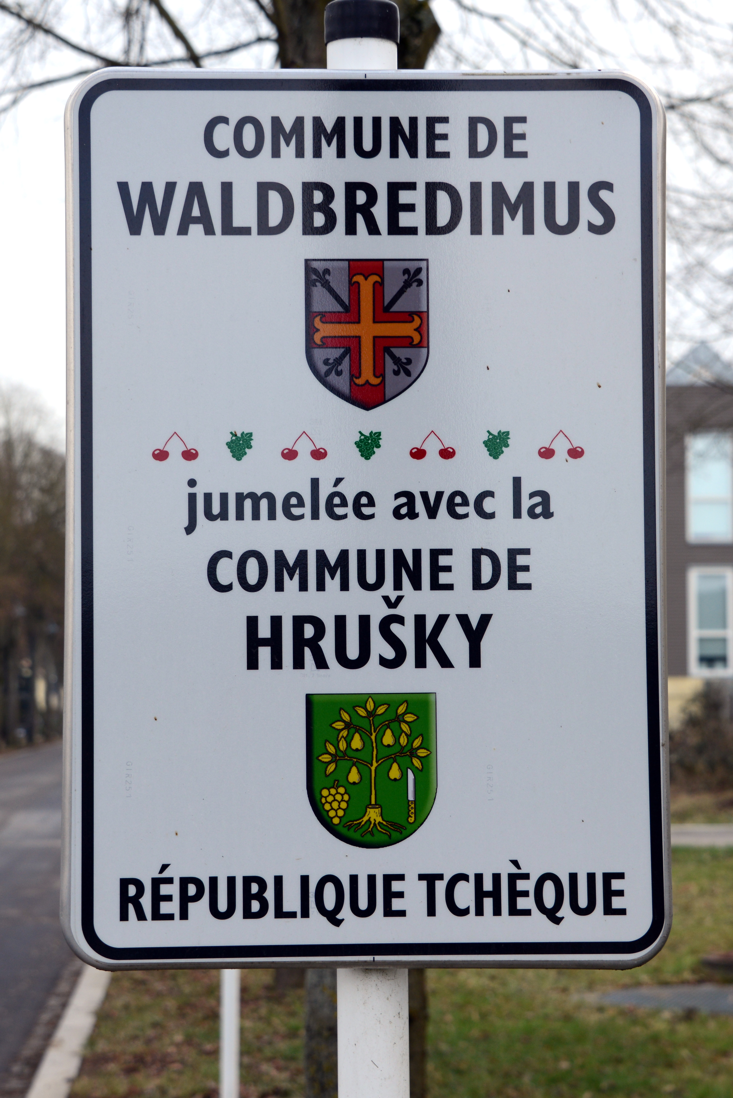 Waldbriedemes ass mat Hrušky (Břeclav District) jumeléiert.